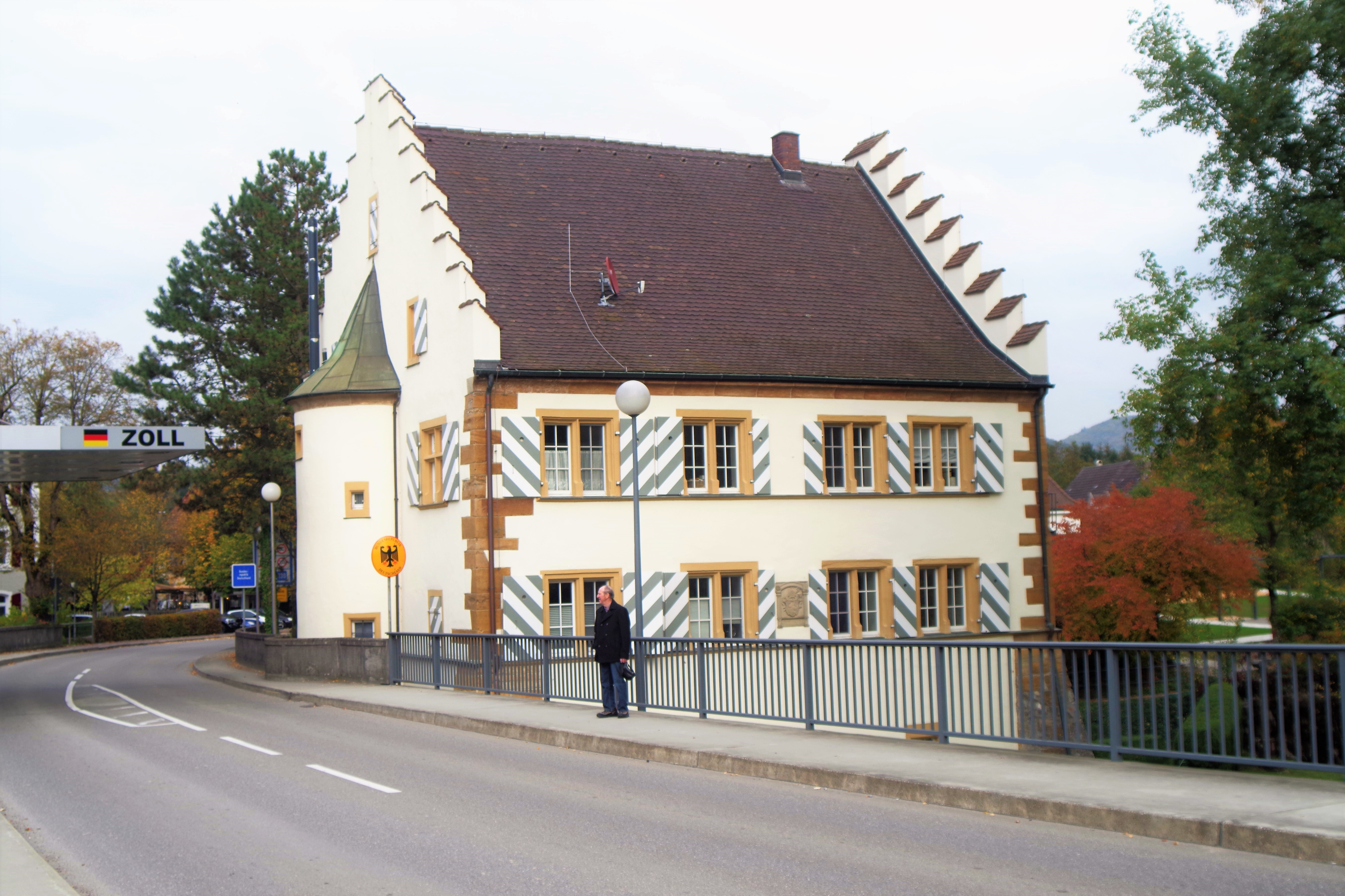 Rheinauer Amtshaus in Rheinheim